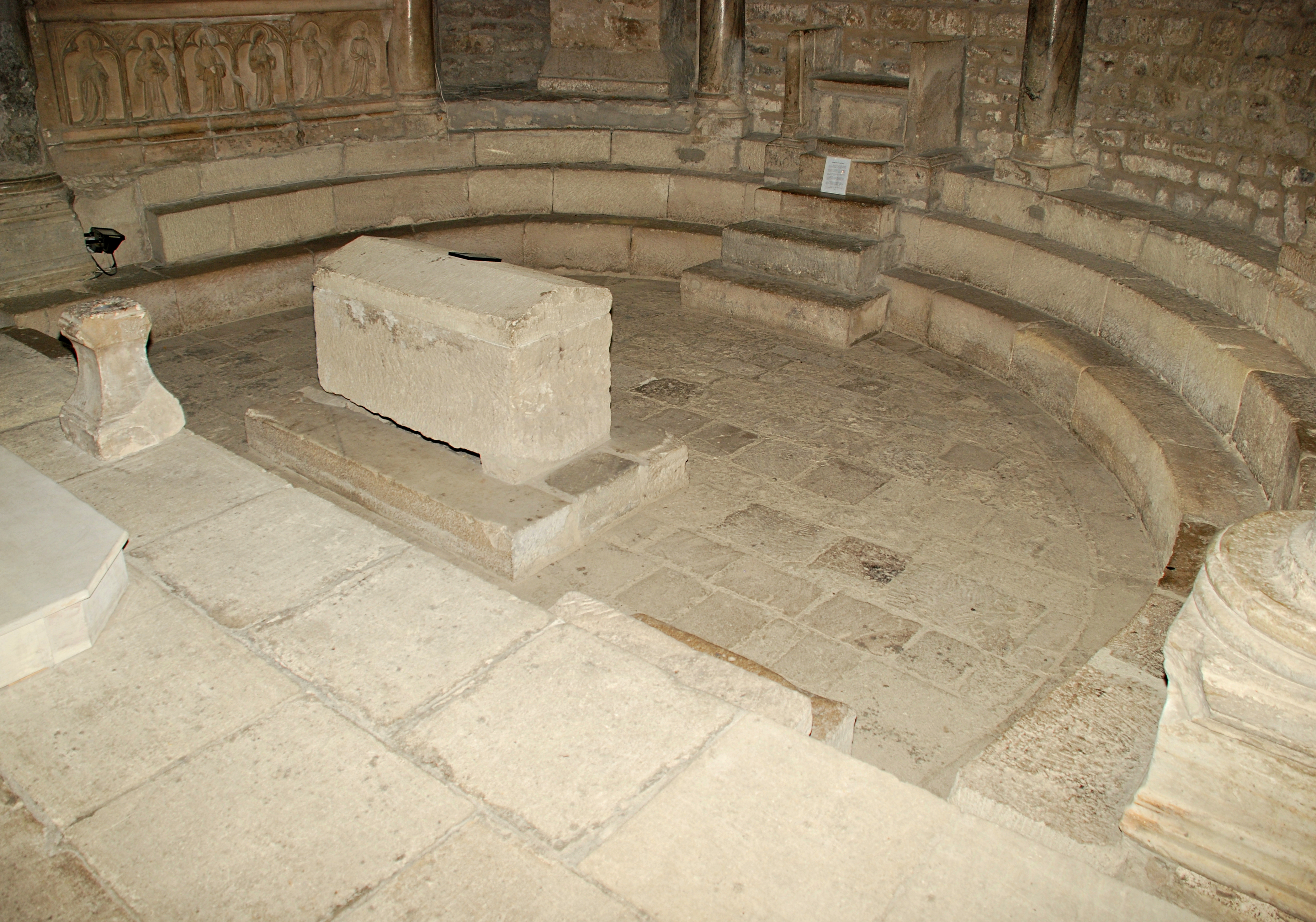 Vaison - Chevet de plan outrepassé